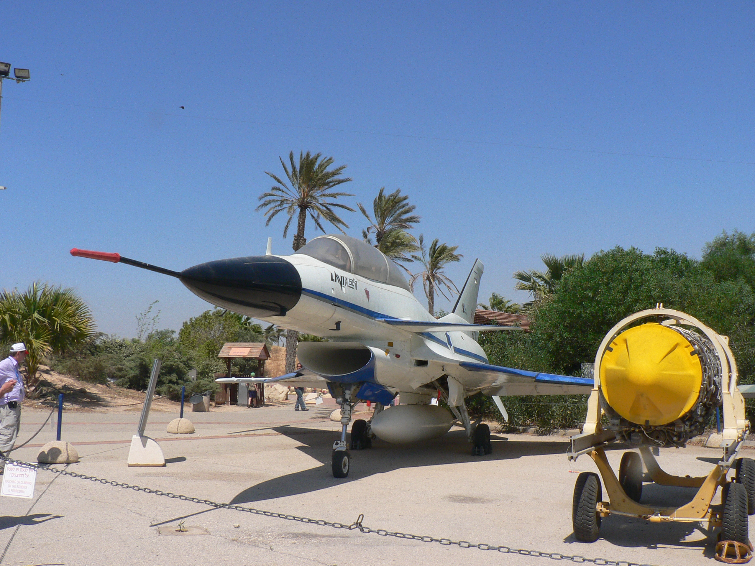 IAF IAI Lavi לביא